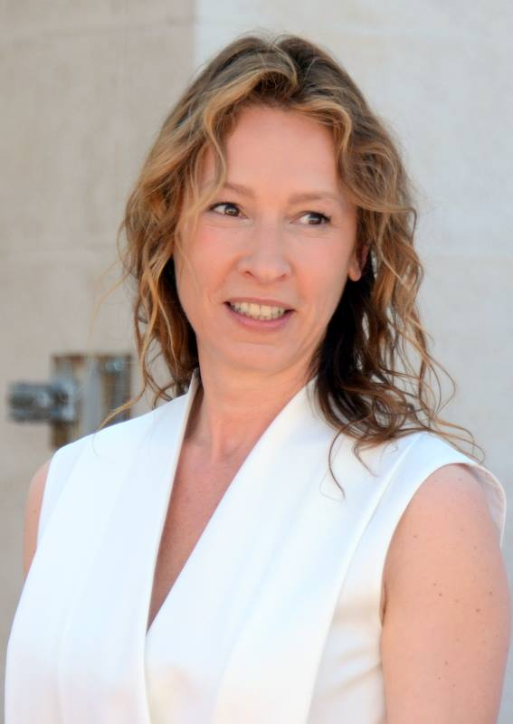 Emmanuelle Bercot au festival de Cannes